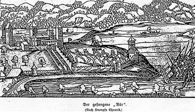 Belagerung von Rapperswil (SG) durch die Innerschweizer während des Alten Zürichkriegs.Beschreibung: Der gefangene «Bär» (Nach Stumpfs Chronik).Dargestellt ist die versuchte 'Kaperung' des Schwyzer Kampfflosses namens «Bär» im Bereich des Endingerhorns in der Kempratnerbucht (Zürichsee) durch die Rapperswiler/Habsburger Besatzung der Rosenstadt. Diese versuchte mit einem im Wasser verborgenen Haken das Kriegsfloss an die Stadtmauern heranzuziehen.Deutlich zu erkennen sind die westliche Stadtbefestigung im Umfeld des heutigen Kapuzinerklosters, der Lindenhof (Schlosshügel) und die markante Stadtansicht mit (links) Stadtpfarrkirche und Schloss, sowie im Hintergrund die Holzbrücke, links davon der Obersee.